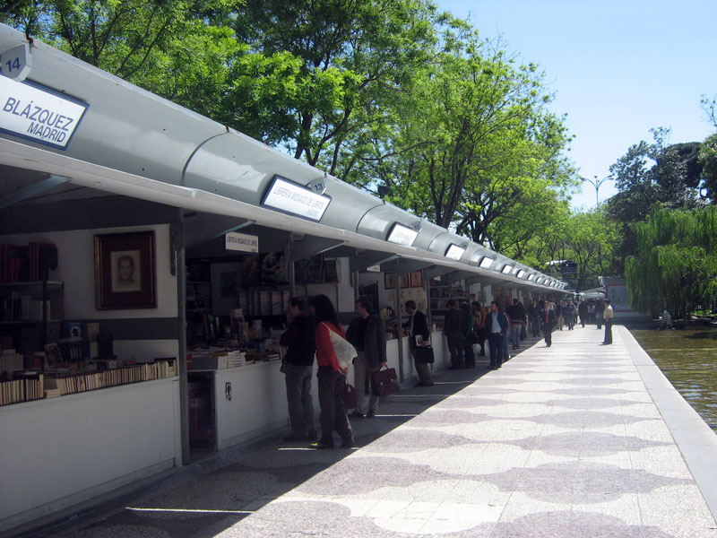 Casetas de la Feria del Libro Antiguo y de Ocasión de Madrid. La fotografía se corresponde con la edición número 32 del evento.